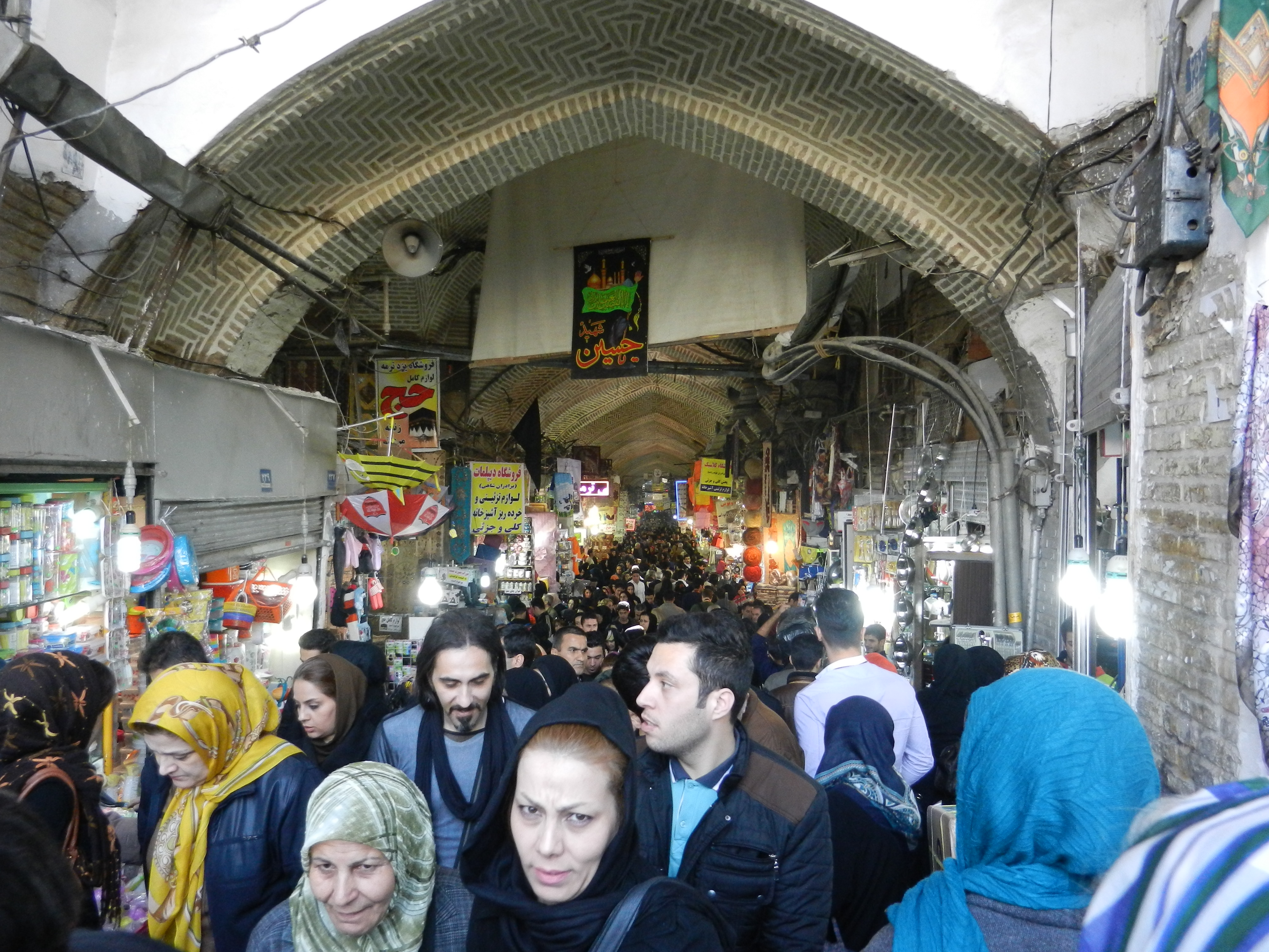 Veliki bazar v Teheranu, Iran.